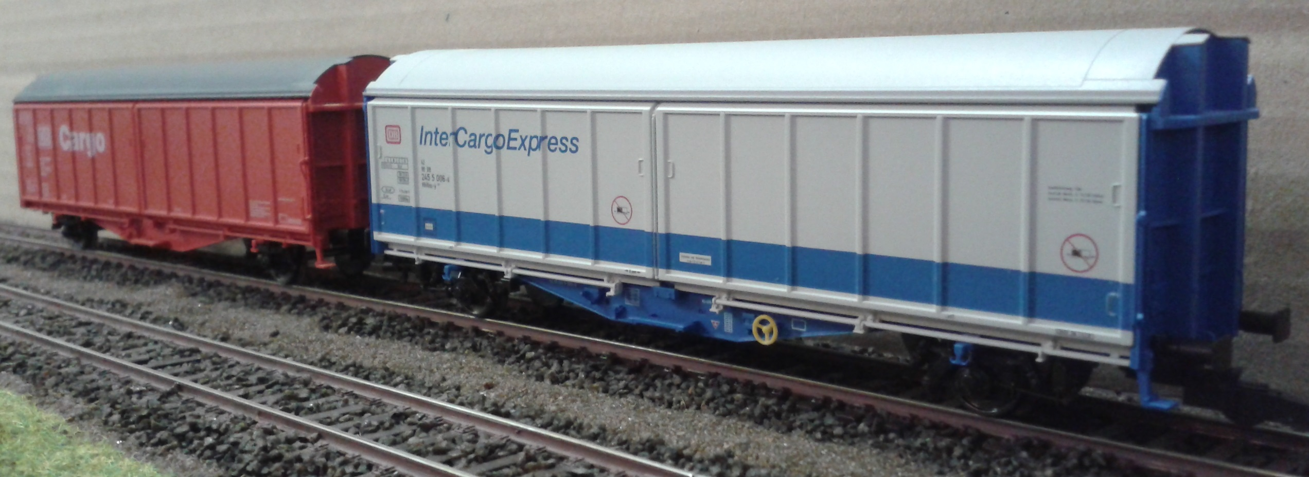 Model von Schiebewandwagen Baureihe Hbillss-y 307 von die Deutsche Bundesbahn für die InterCargoExpress (Fleischmann Artikelnr. 5370) mit im Hintergrund die Ursprungsversion Hbillns 303 (Fleischmann).